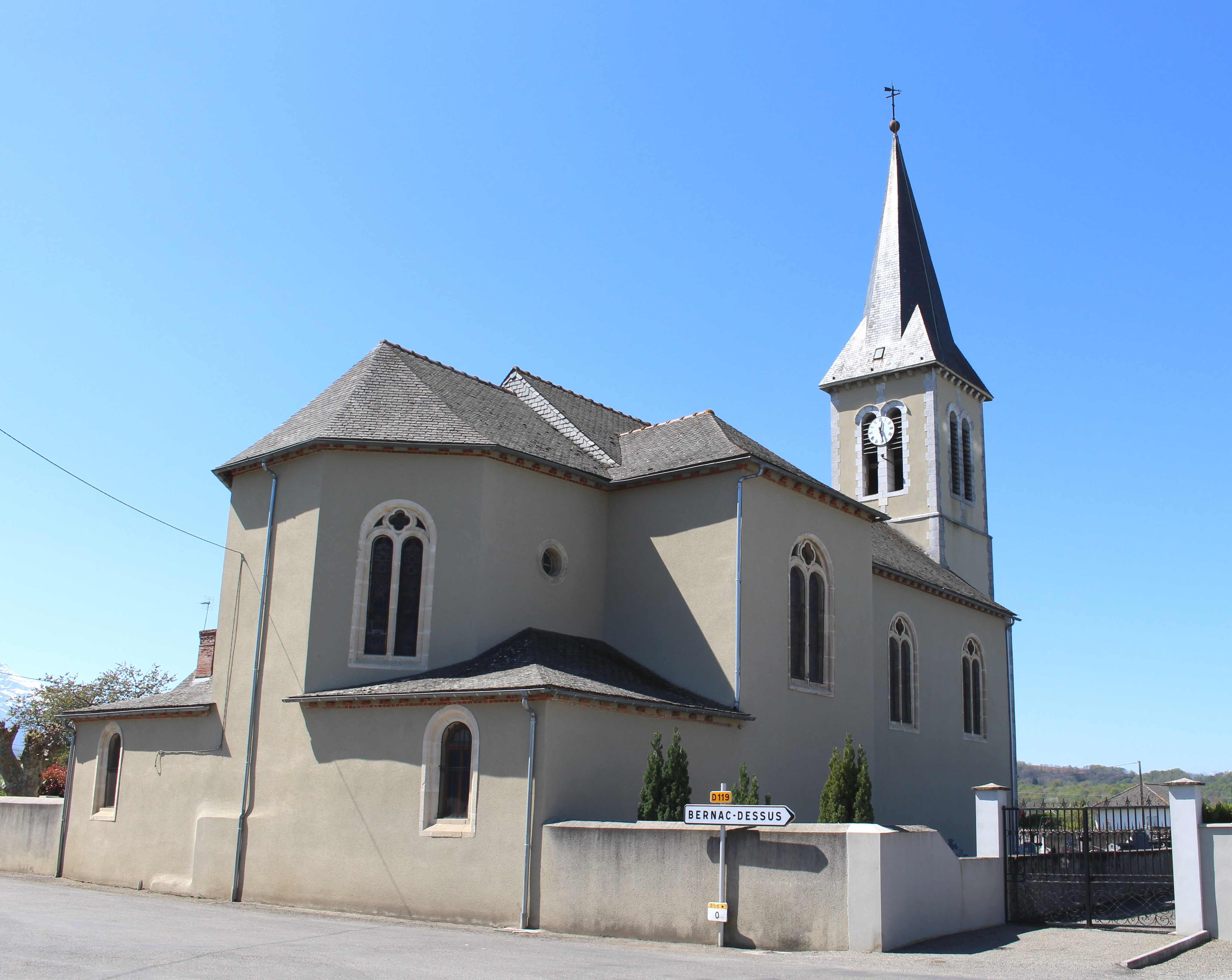 Église Saint-Jean-l'Evangéliste de Vielle-Adour (Hautes-Pyrénées)